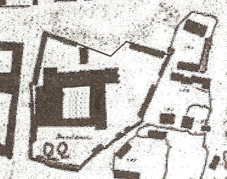 костел кларисок (фрагмент плану 1777 року)